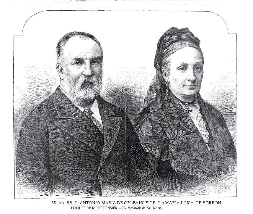 I duchi di Montpensier, Antonio d'Orleans con la consorte Infanta Maria Luisa di Borbone-Spagna